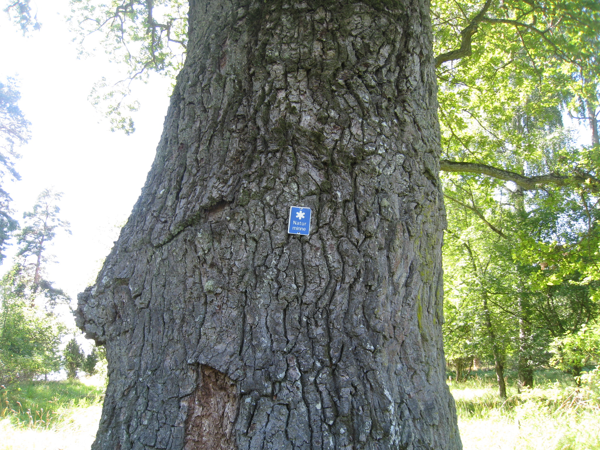 Hummelmora hage i Görvälns naturreservat i Järfälla kommun i Stockholms län.